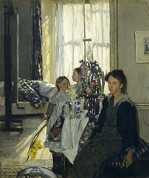 Estudio interior - óleo sobre lienzo - Alto: 99,4 cm. Ancho: 84,4 cm. - Art Gallery of South Australia, Adelaide